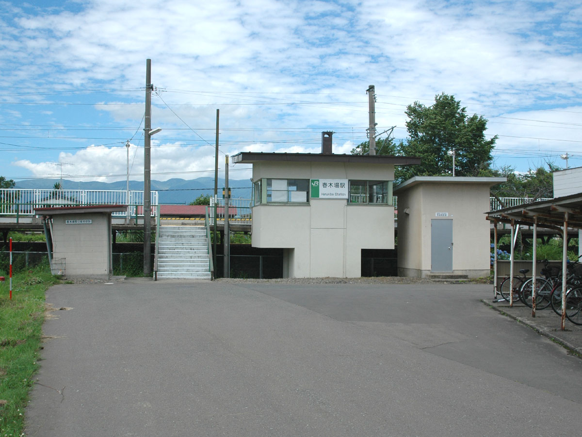 Harukiba Station, Shizukuishi, Iwate, Japan